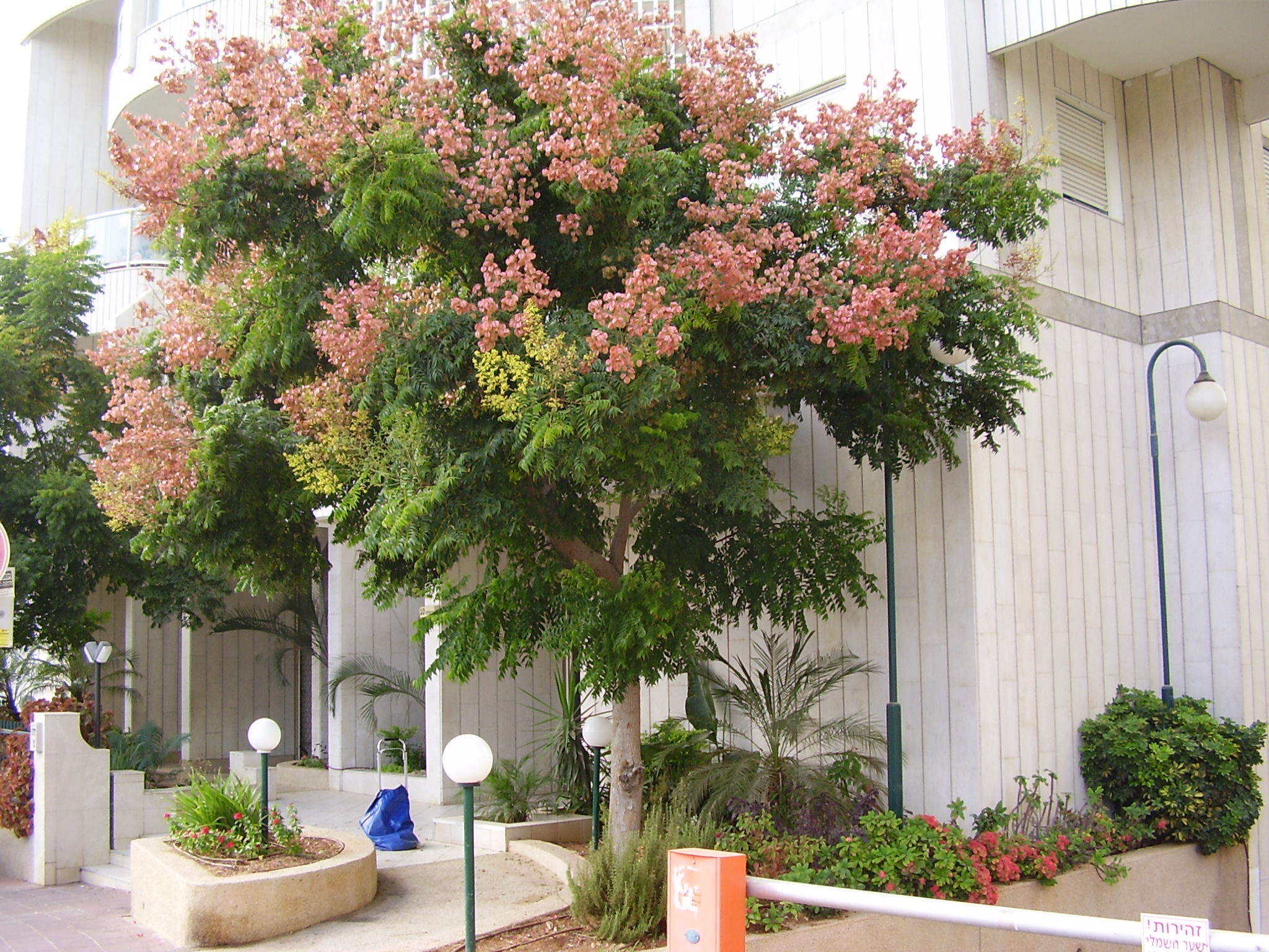 koelreuteria bipinnata, ramat -gan , israel